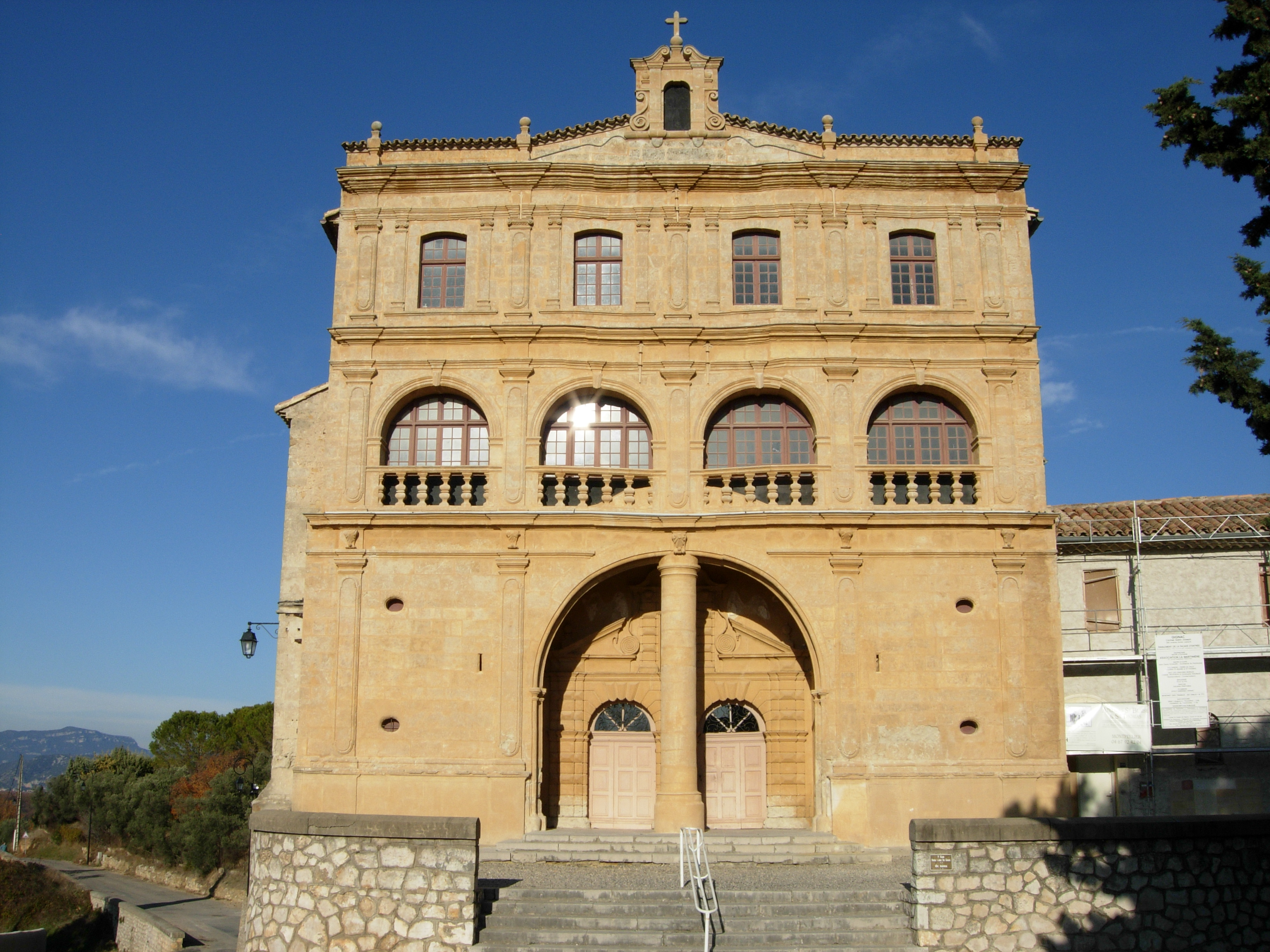 Gignac (Hérault) - Notre-Dame de Grâce (XVIIe siècle). Le pilier a été placé en 1776 afin de soutenir le premier étage.